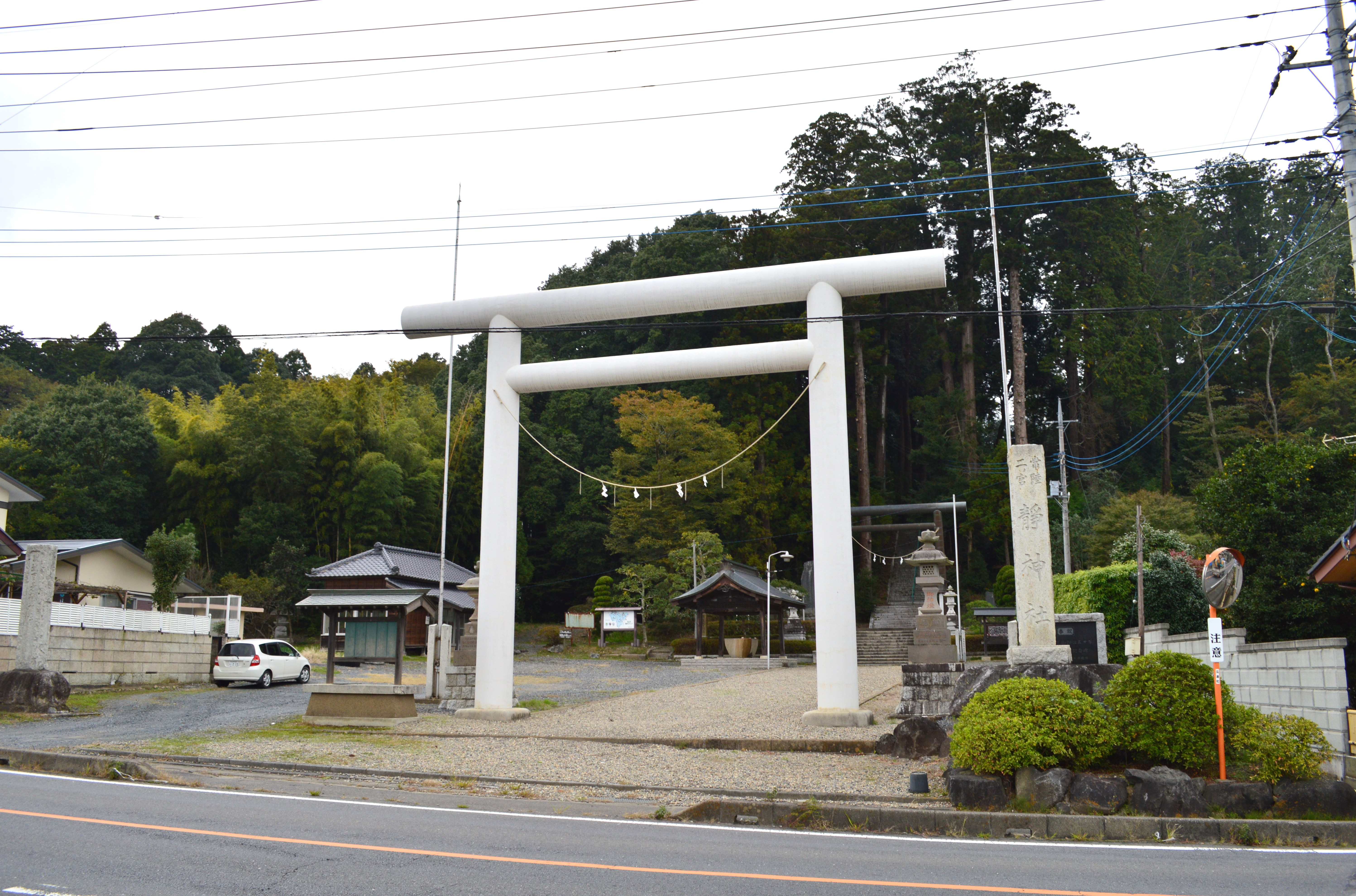 静神社 (那珂市) 大鳥居